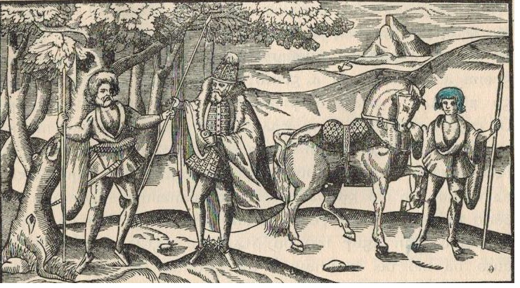 Grianghraf ón téacsleabhar Stair na hÉireann